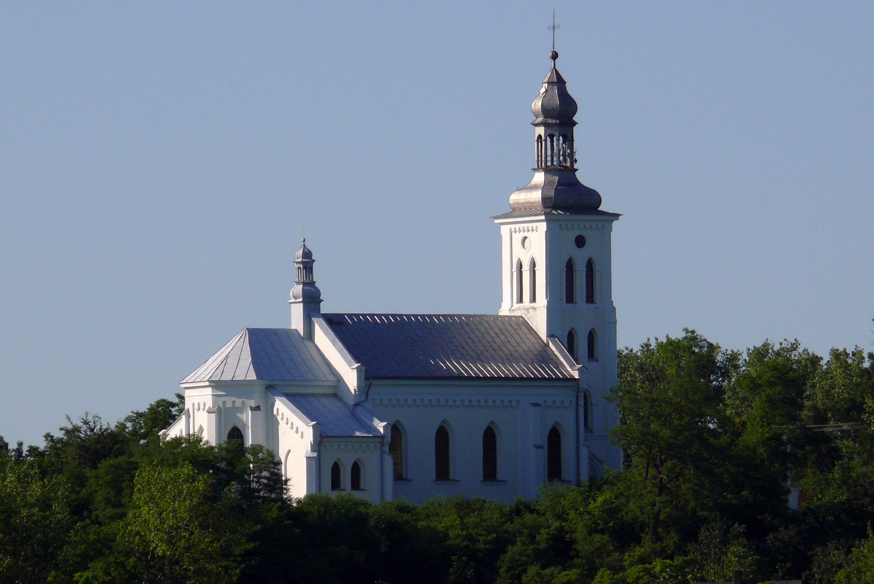 kościół parafialny Narodzenia Najświętszej Maryi Panny w Chełmnie nad Nerem